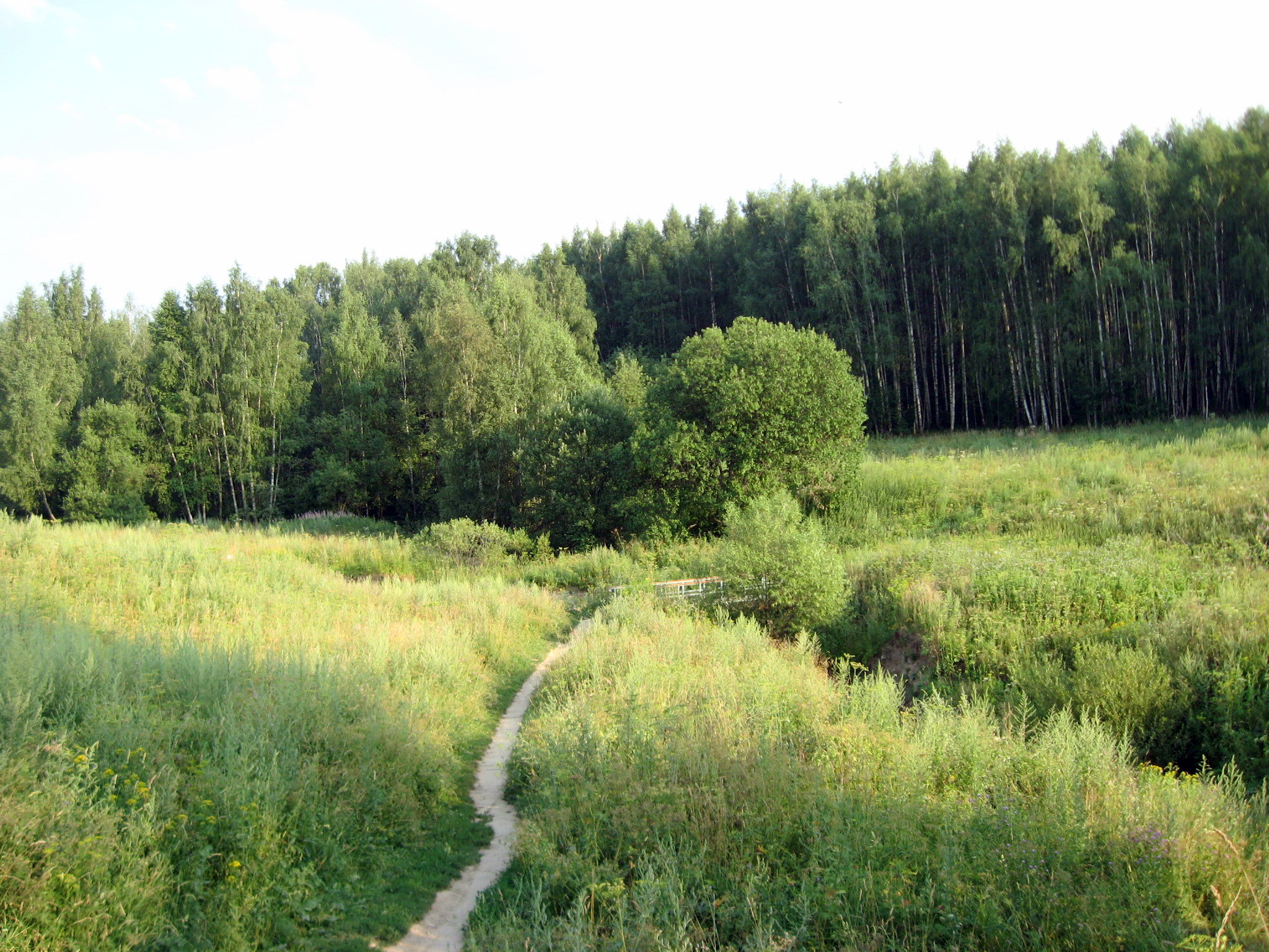 Русло реки Чертановки рядом с Лысой Горой. Битцевский лесопарк.